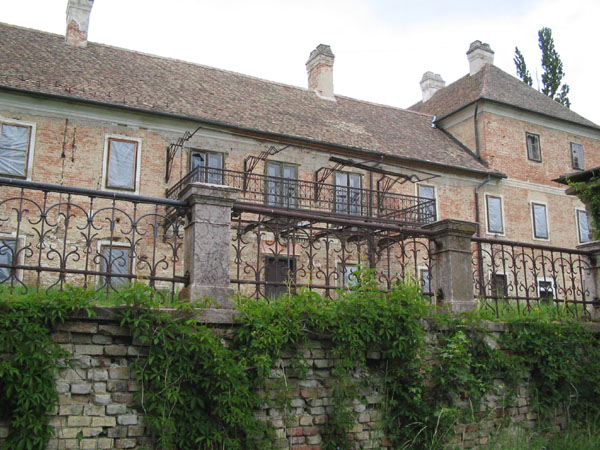 Majki műemlékegyüttes, kastély